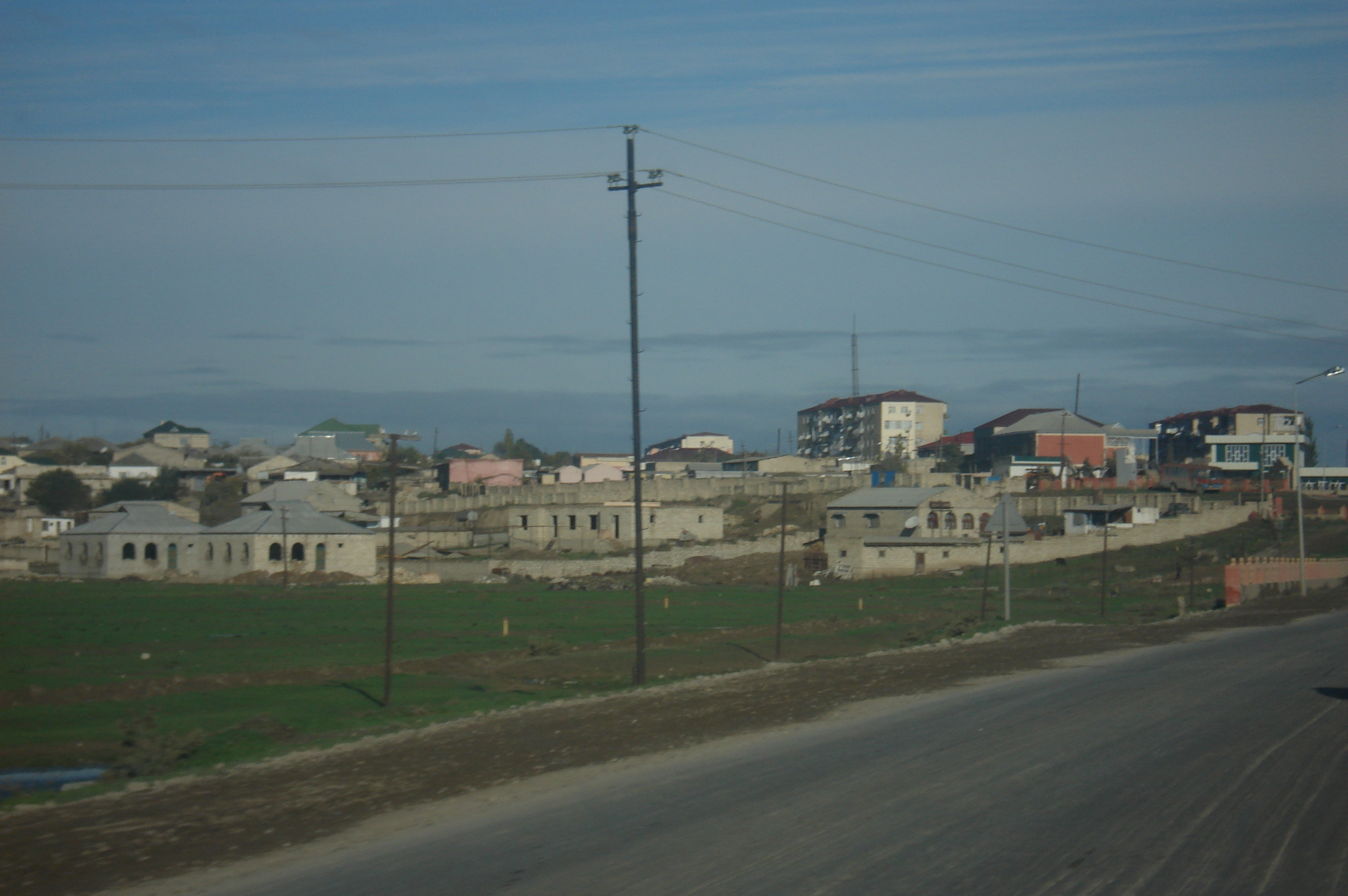 Город Сиазань